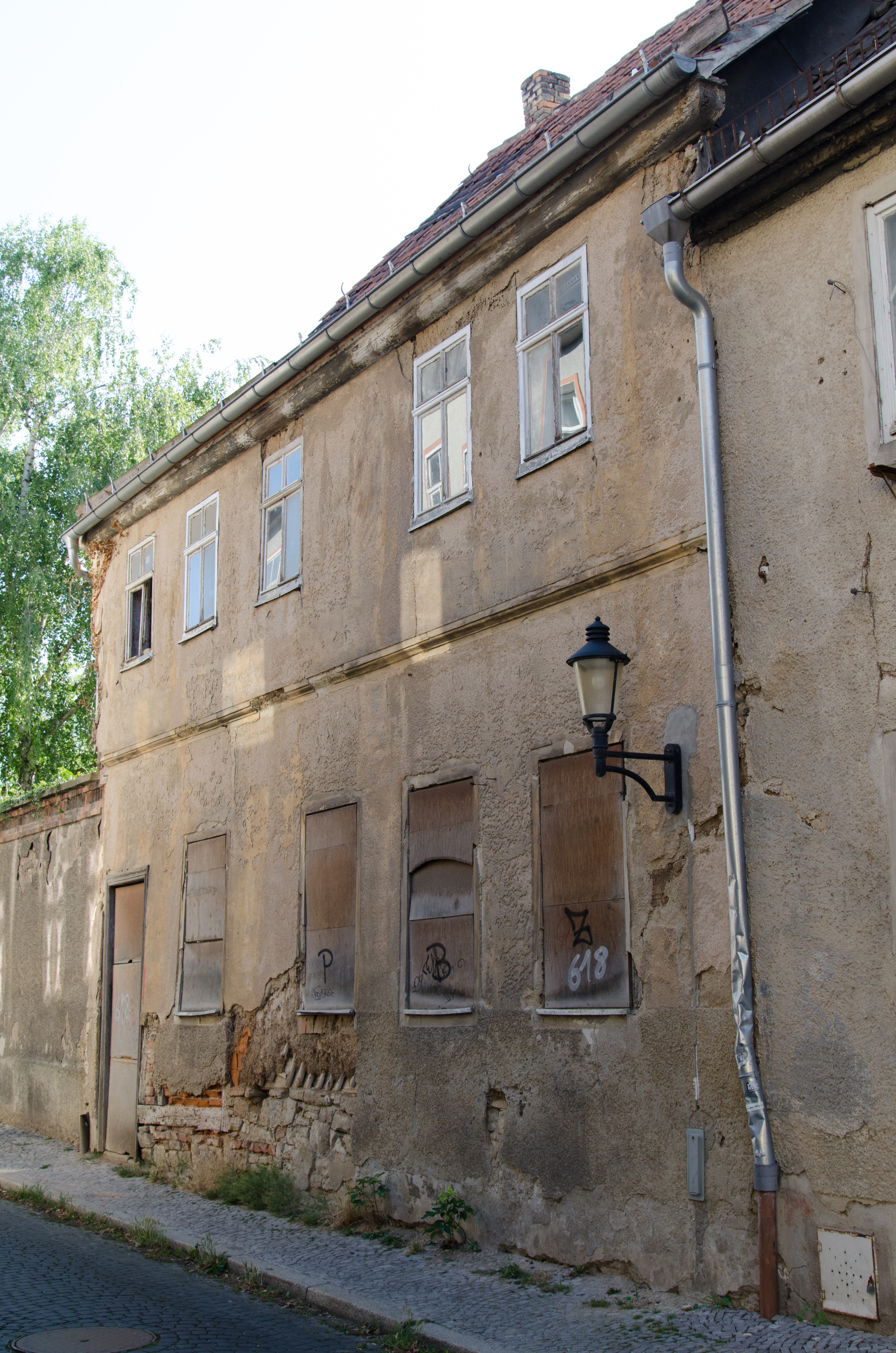 Naumburg, Mühlgasse 12